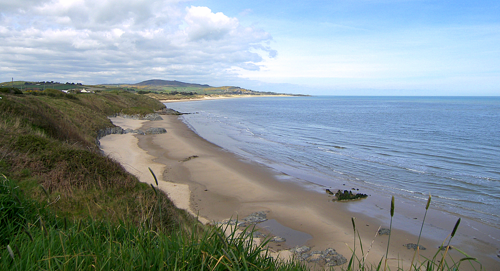 brittas bay june 2007